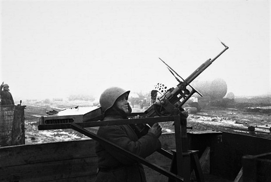 Зенитчик зенитного поезда «За Сталина» красноармеец Ф. Червонный, отличившийся при отражении вражеского авианалёта